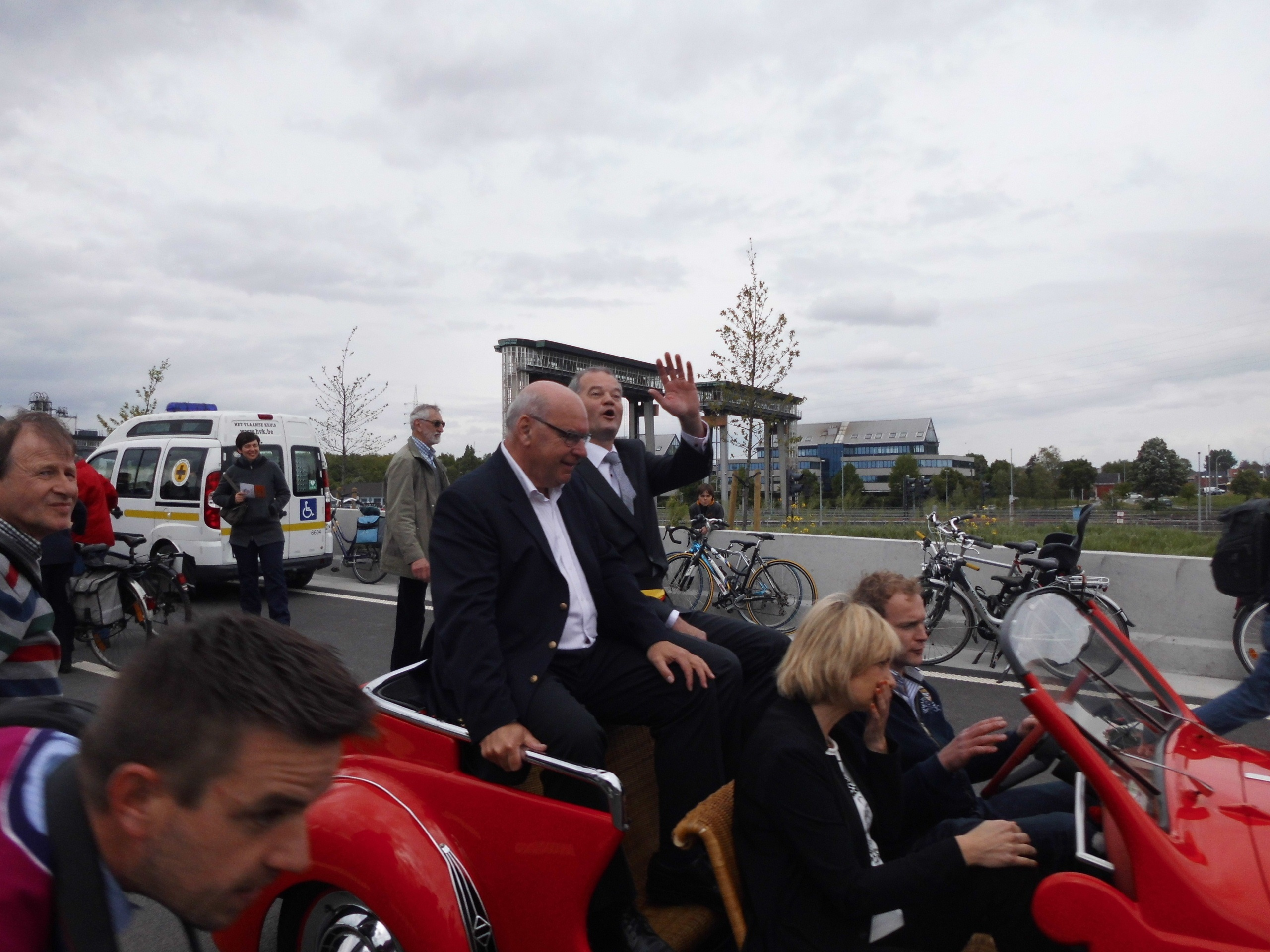 Minister Hilde Crevits en de burgemeesters (l.) Daniël Termont (Gent) en Filip Thienpont (r.) (Merelbeke) tijdens de opening van het laatste sluitstuk van de R4 - Merelbeke - Oost-Vlaanderen - België